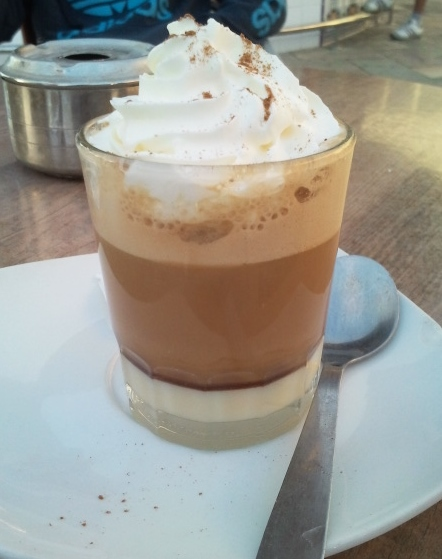 Barraquito servido en Los Llanos de Aridane, La Palma, Canarias.